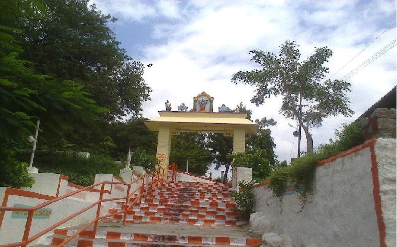 కురుమూర్తిస్వామి మెట్లదారి